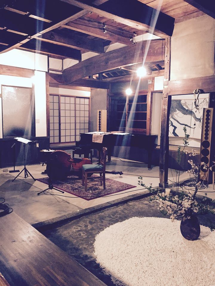 SHIKIORIの土間